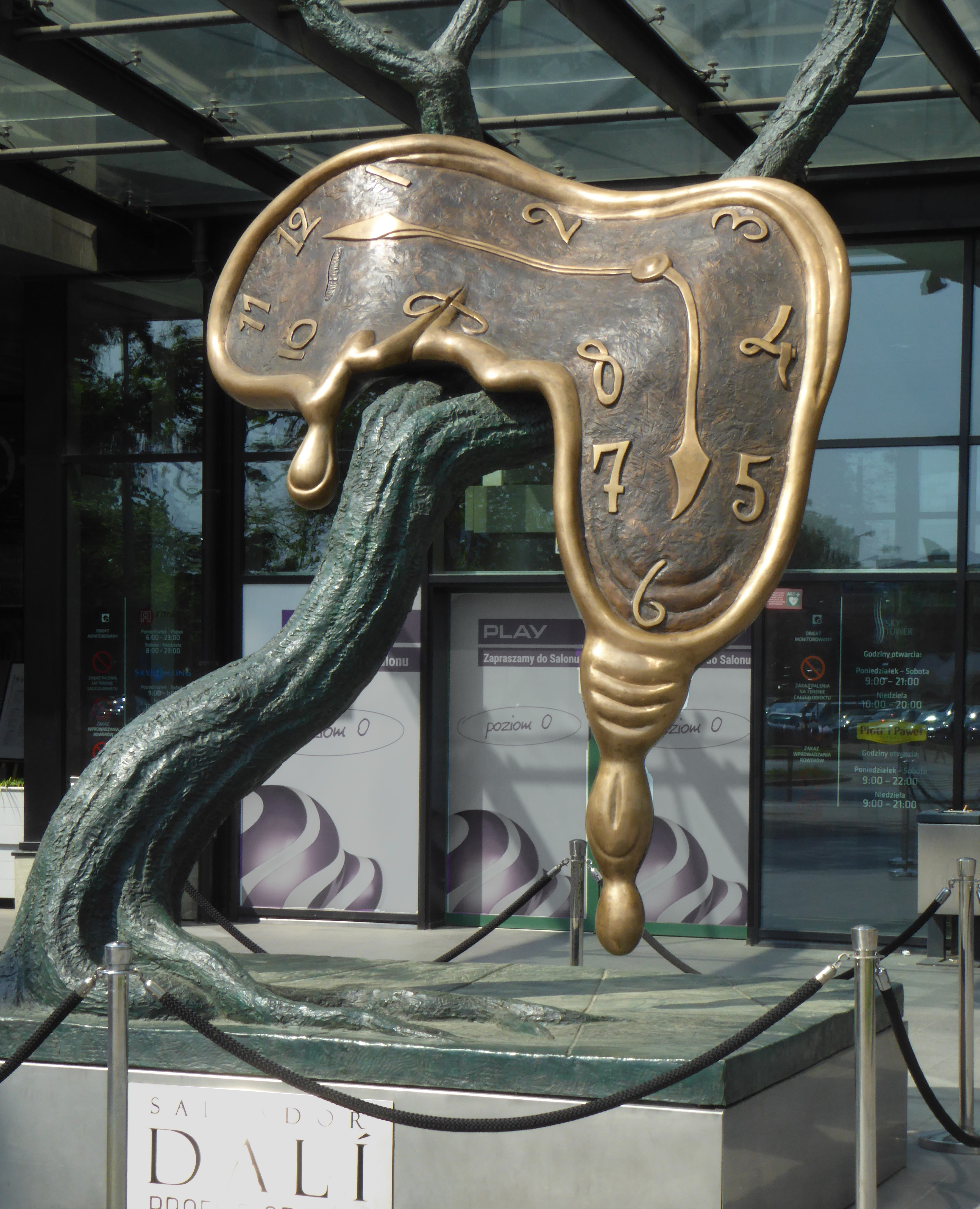 Limitierte Museums-Edition einer Bronzeskulptur